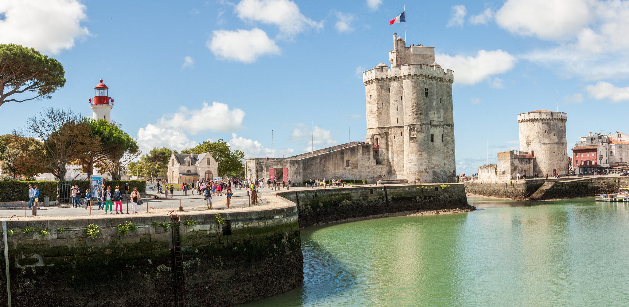 500px provided description: Panorama de la sortie du vieux port de La Rochelle [#hdr ,#port ,#pier ,#france ,#marina ,#panorama ,#skyline ,#riverside ,#quay ,#embankment ,#waterfront ,#harbor ,#medienhafen ,#mer ,#bateau ,#tiber ,#esplanade ,#soleil ,#charente ,#water front ,#poitou]